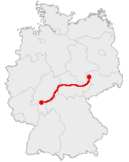 Course Map of Deutsche Goethestraße